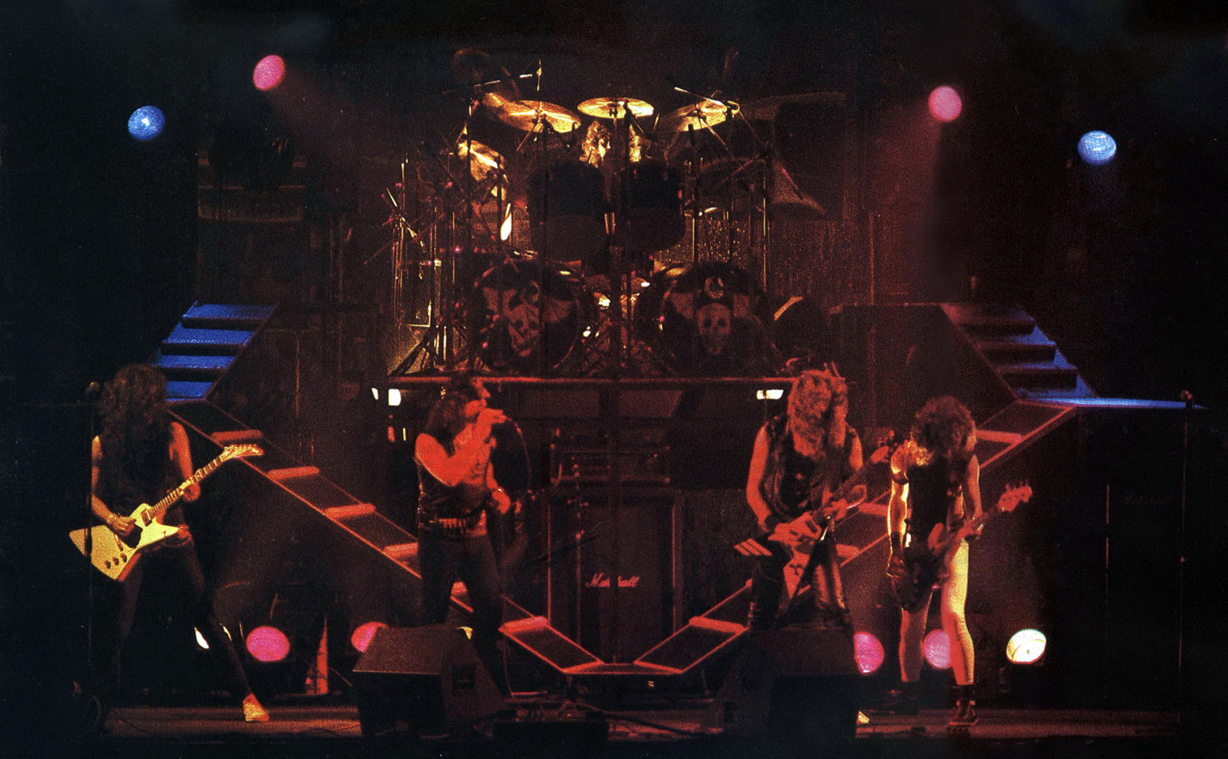 Angeles del Infierno 1º Formación - Manu, Juan, Iñaki, Robert y Santi sobre el escenario en Madrid 1985